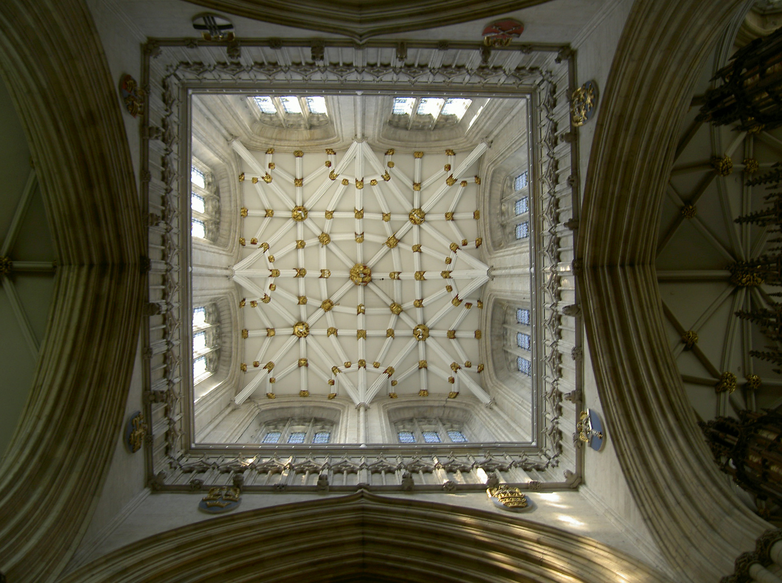 Blick auf das Netzrippengewölbe in der Vierung des Yorker Minster